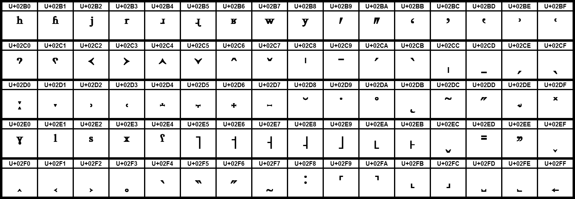 Grafiktafel für den Unicodeblock Raumeinnehmende, modifizierende Zeichen.